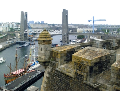 Vue de de la ville de Brest, seconde version de la photographie issue de commons à l'adresse suivante ayant un effet d'éclaircissement.